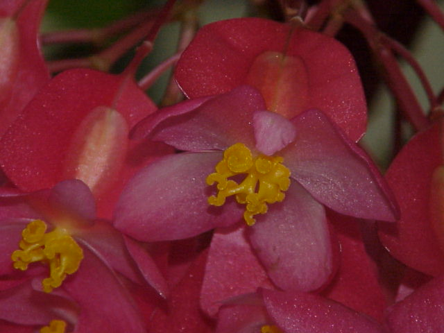 Species: Begonia Family: Begoniaceae Cultivar: Lucerna Image No. 1